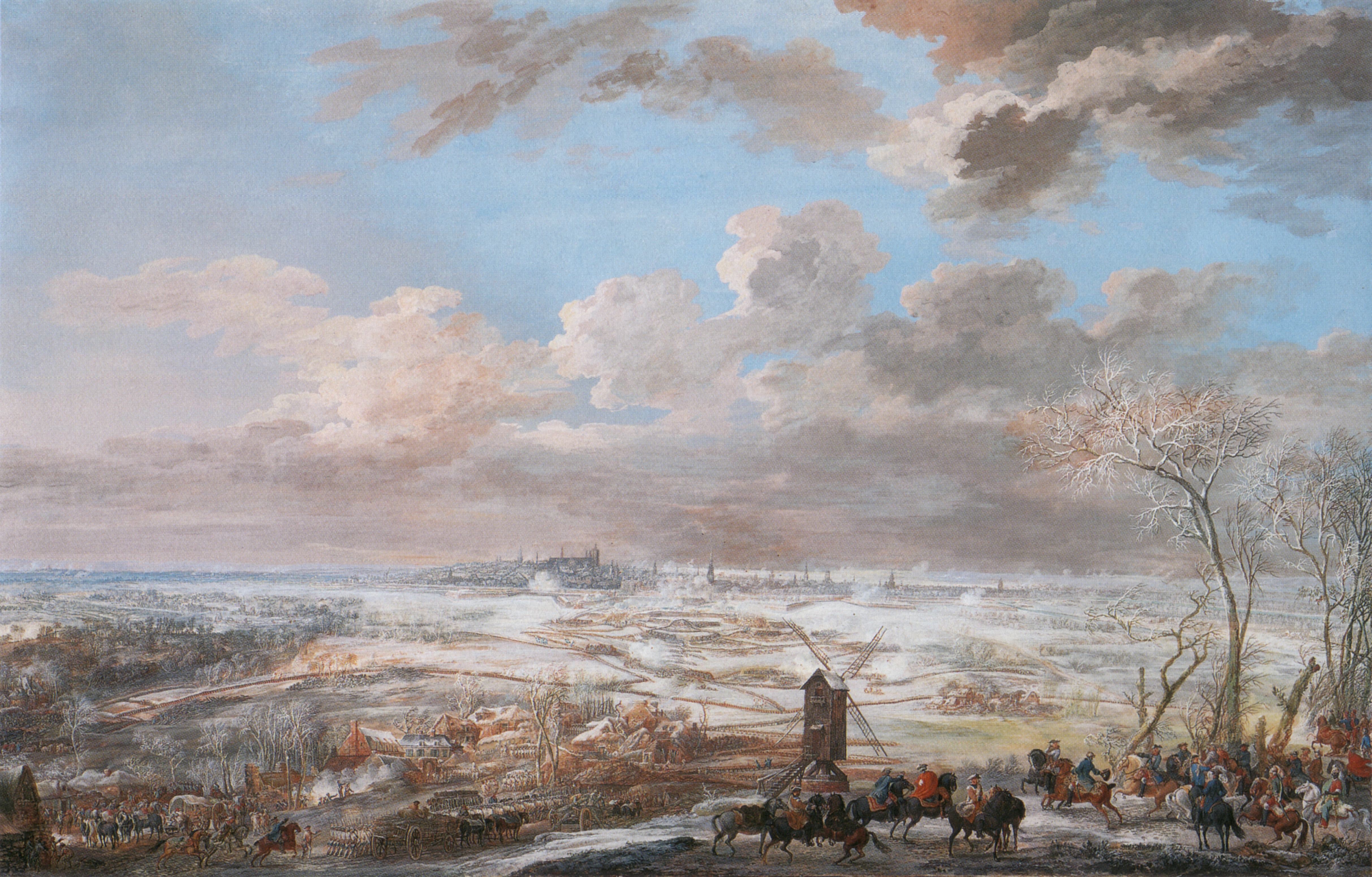 Siège de Bruxelles 1746